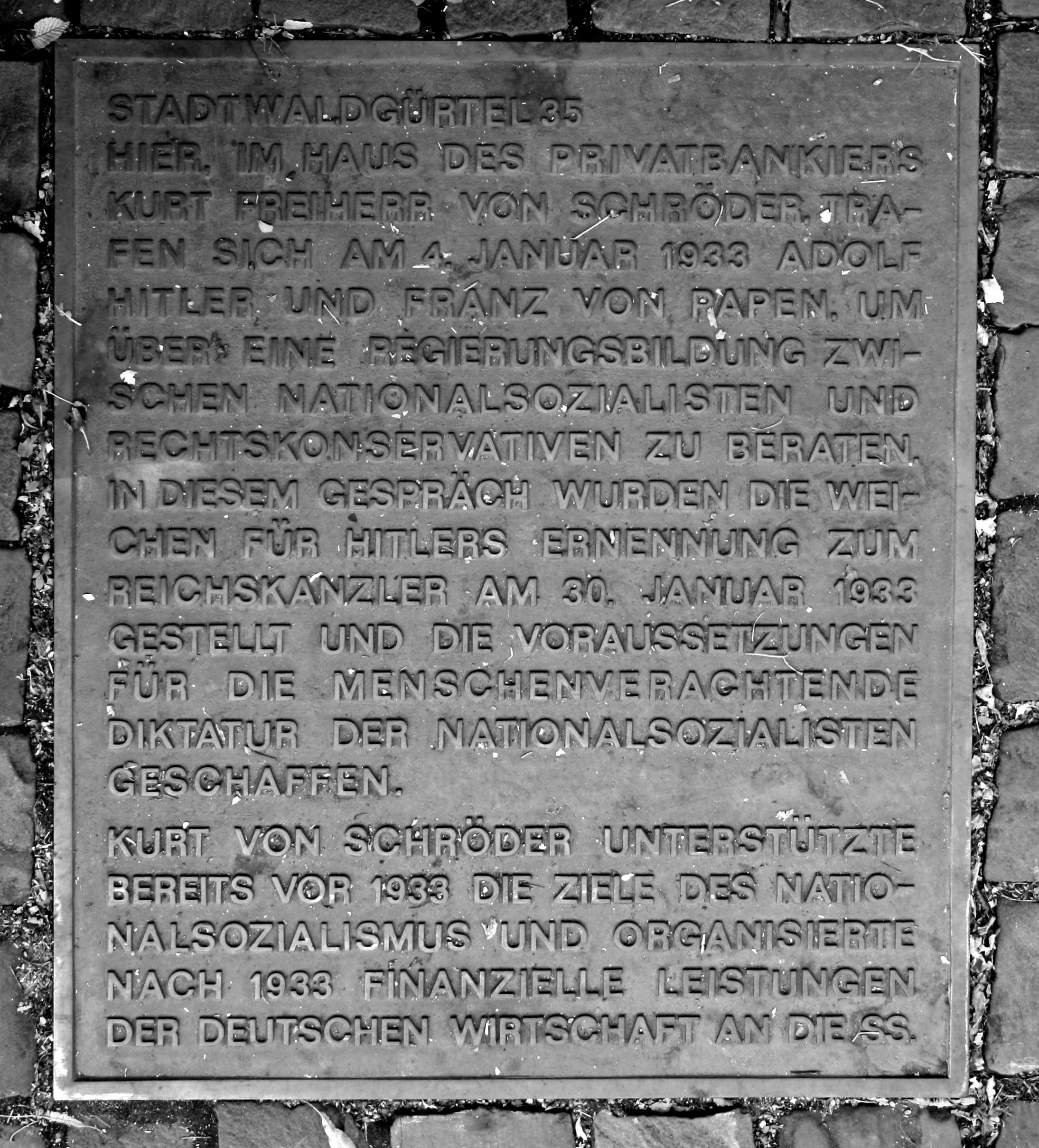 Stadtwaldgürtel 35 in Köln: Ort des Treffen Papens mit Hitler im Haus des Bankiers Schröder. Tafel auf dem Bürgersteig vor dem Haus